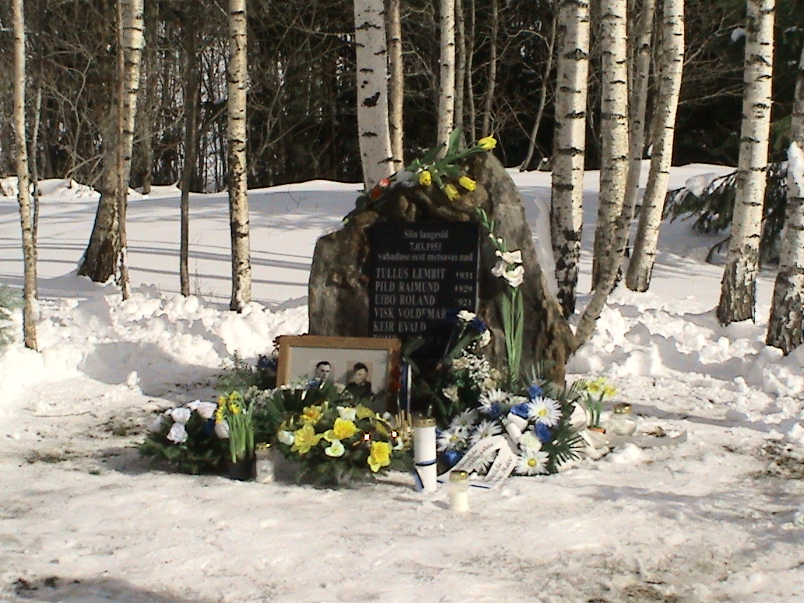 Saika punkrilahingus langenud metsavendade mälestusüritus.